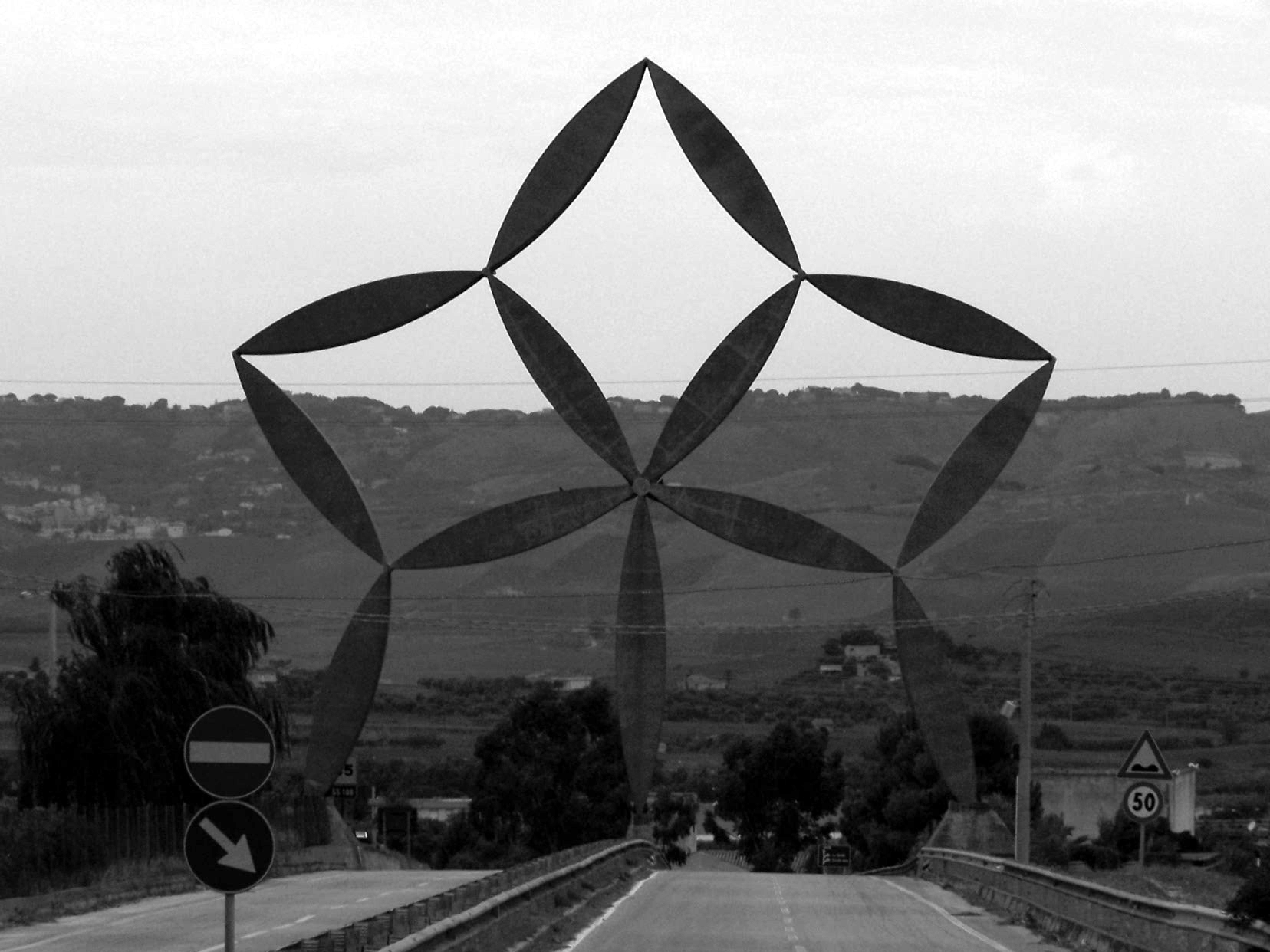 Porta del Belice - Consagra